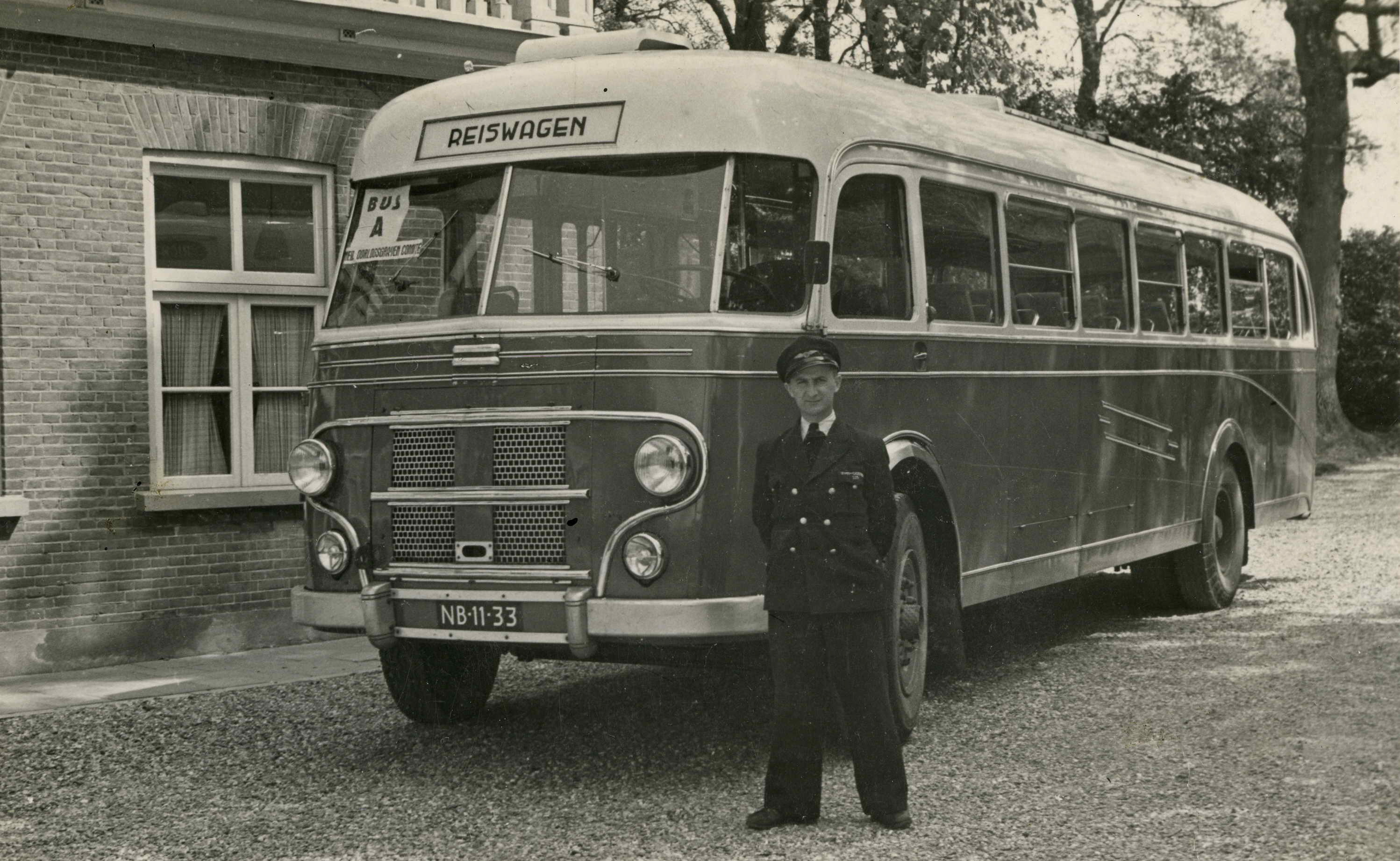 Chauffeur R. van de Locht bij een reisbus van busmaatschappij Zuid-Ooster